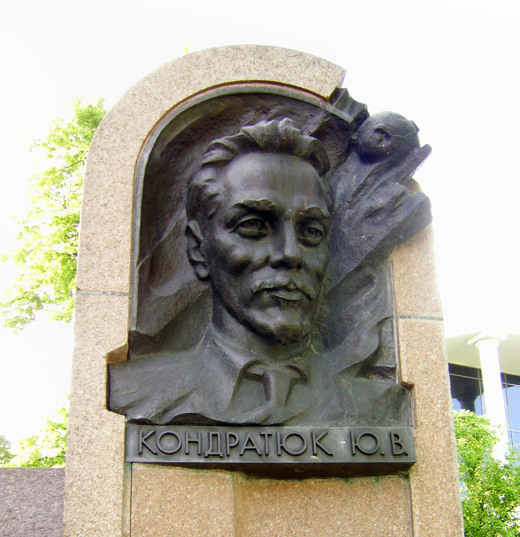 Меморіальна дошка на честь вченого ракетобудівника Ю.В.Кондратюка., Полтава, Комсомольська вул., 4.